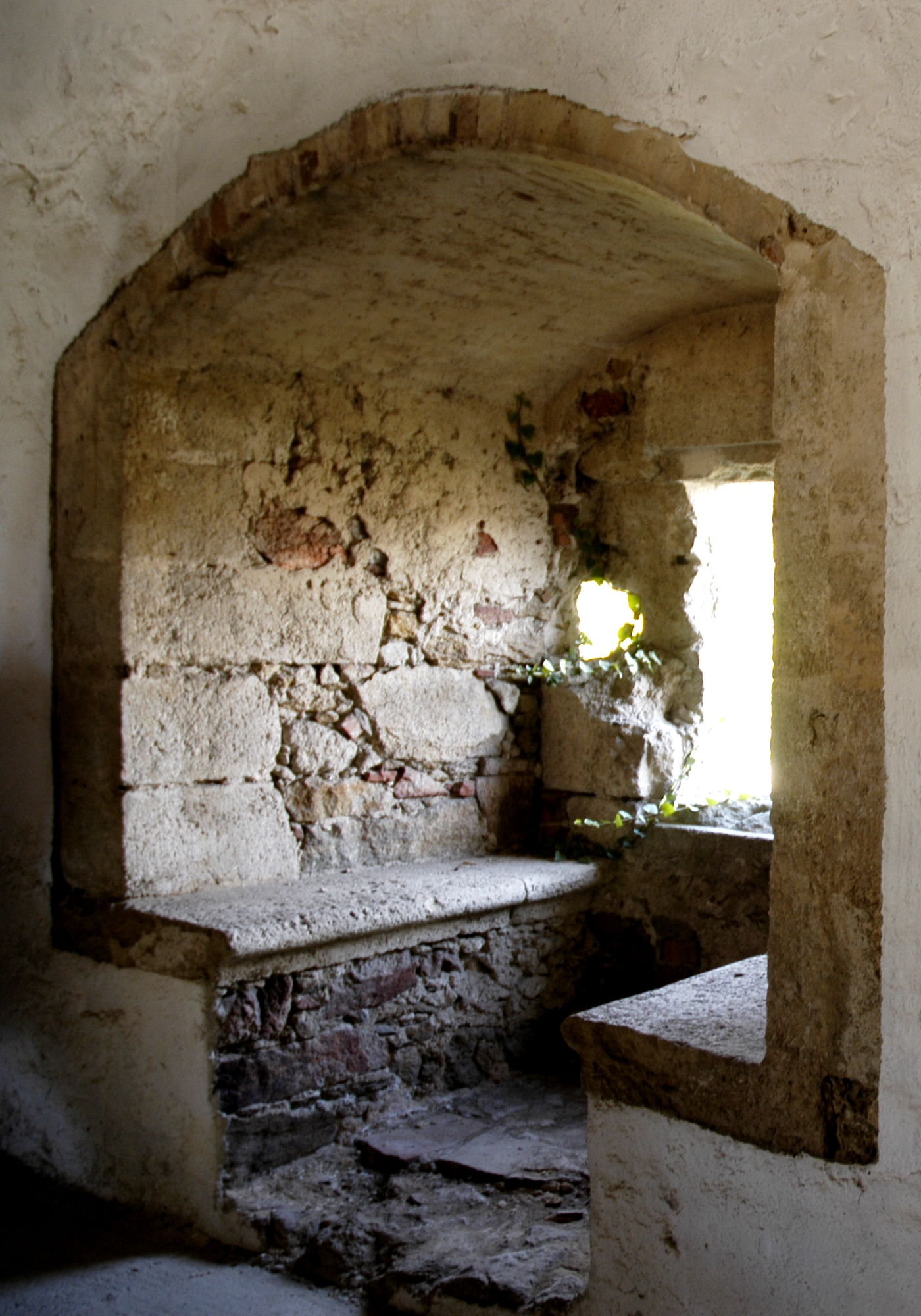 Schrattenthal - Schloss / Sitznische in der Scheune, ehem. Außenmauer der Befestigung, Beobachtungsplatz, links neben dem Schlitzfenster nach unten gerichtete Schießscharte Dieses Bild wurde anlässlich des österreichischen Tags des Denkmals 2012 in Niederösterreich eingereicht.